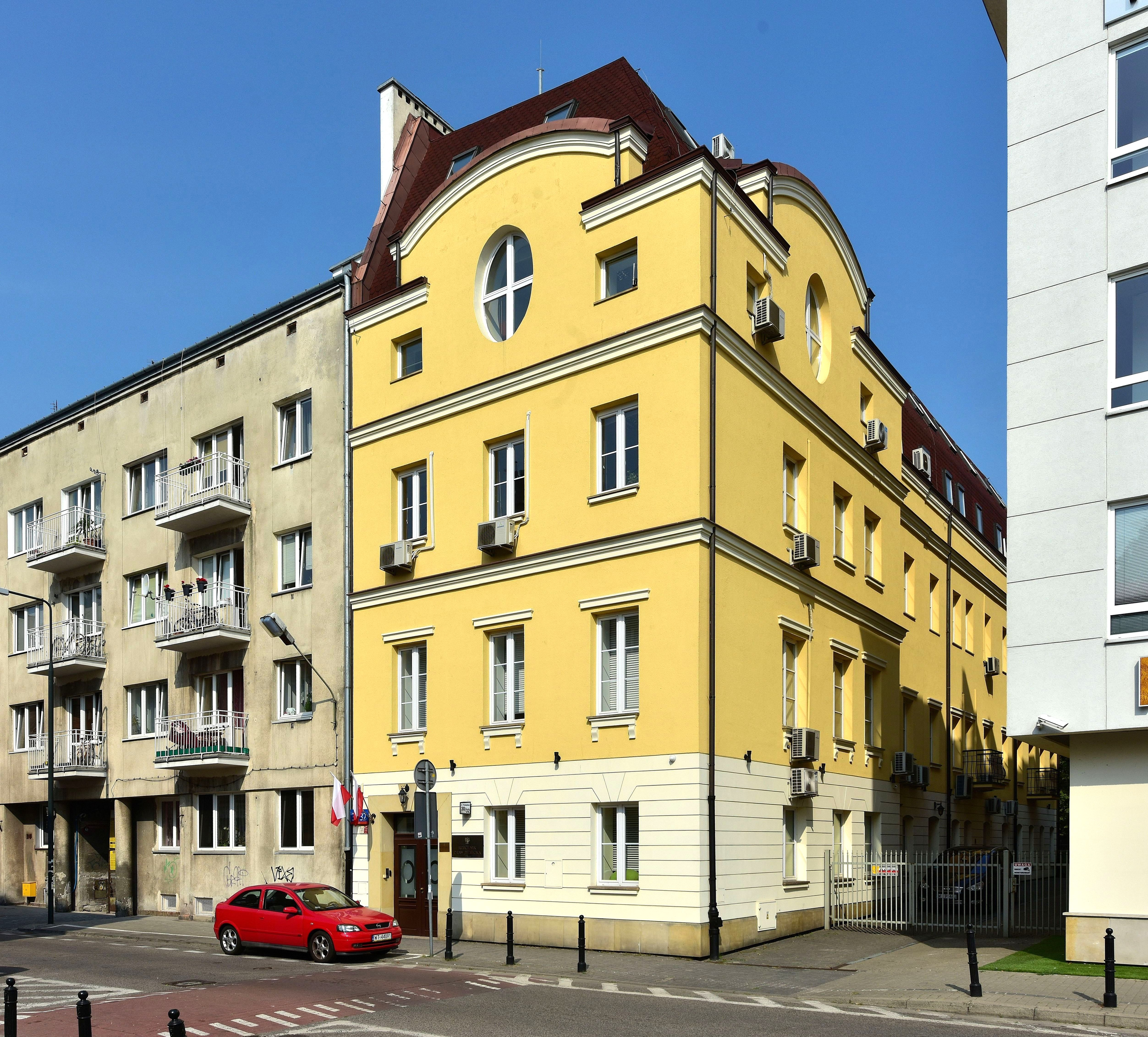 Siedziba Biura Rzecznika Praw Dziecka przy ul. Przemysłowej 32 w Warszawie